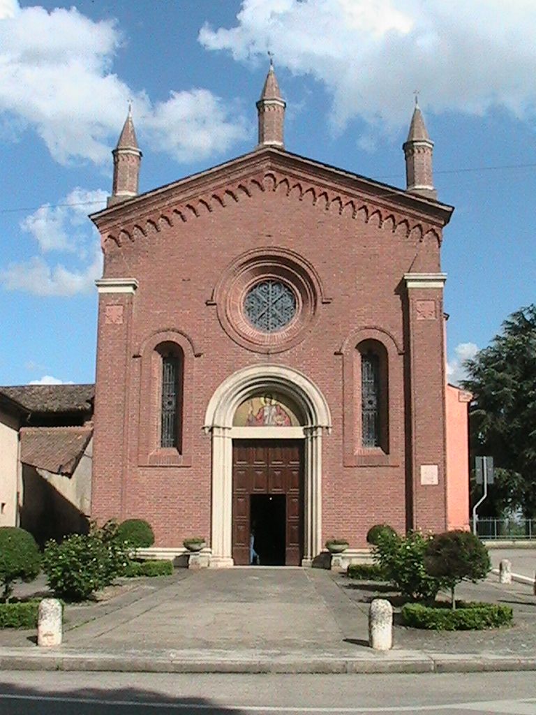 Tornata- Chiesa parrocchiale di Sant'Antonio abate e S:Ambrogio vescovo